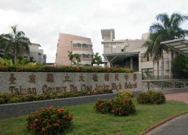 中文（台灣）: 大橋國中校門口。